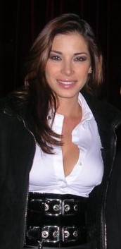 Aída Yespica modelo venezolana residente en Italia